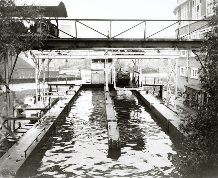 Postjeswetering, overhaal naar Kostverlorenvaart, 20 september 1950 Foto Ben van Meerendonk / AHF, collectie IISG, Amsterdam